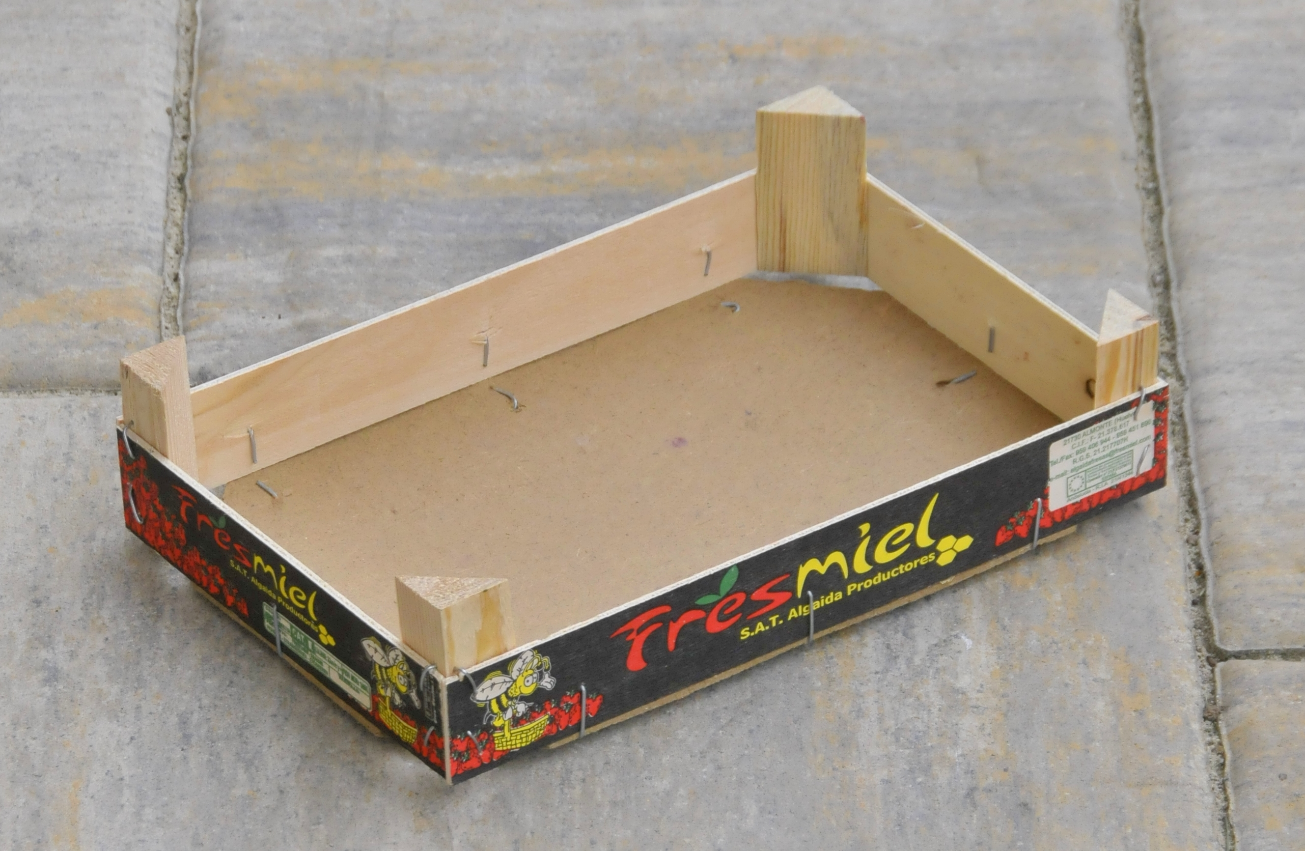 Kleine Obststiege aus Holz und Presspappe